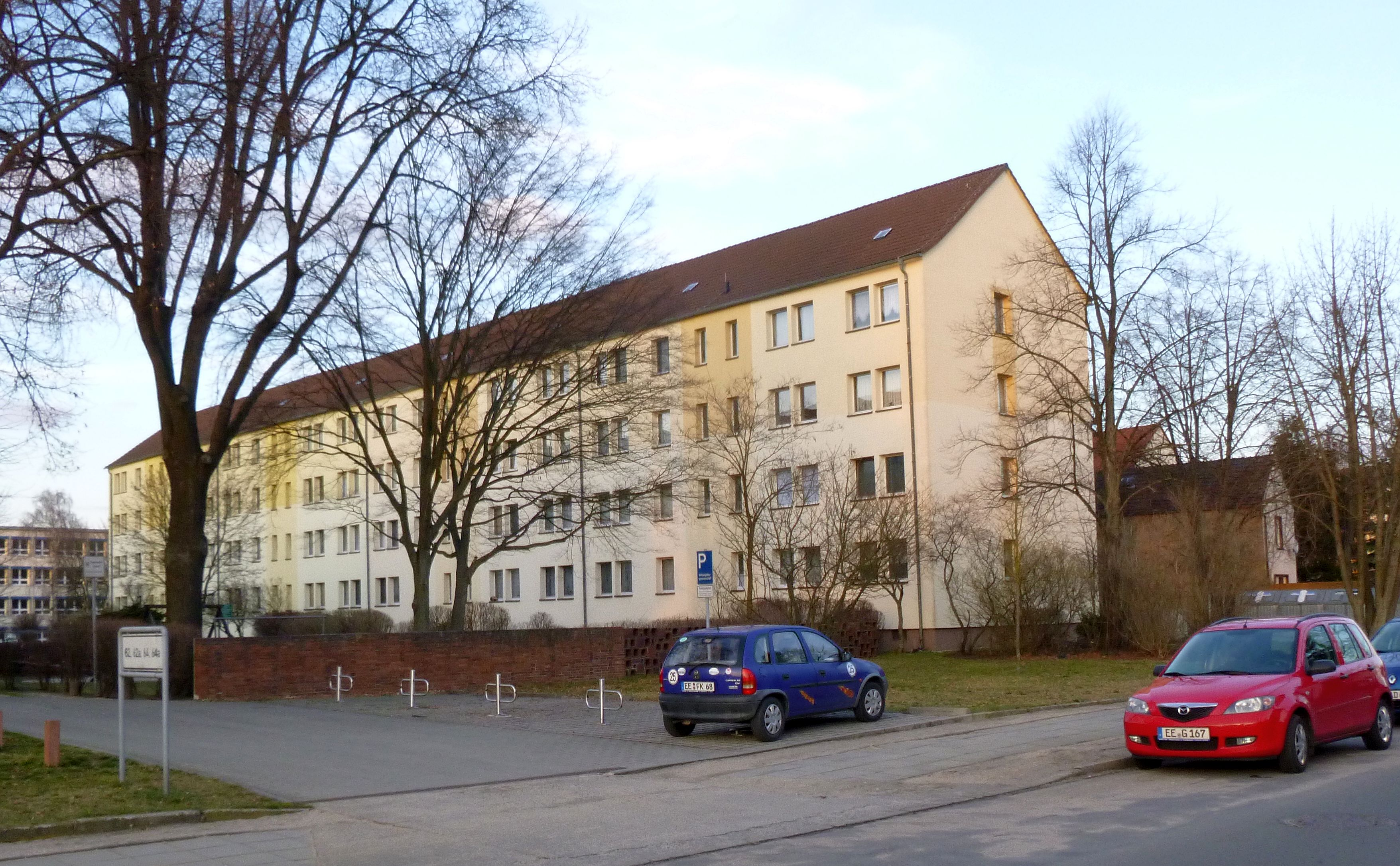 Wohnblock in der August-Bebel-Straße im Elsterwerda Stadtteil Elsterwerda-West